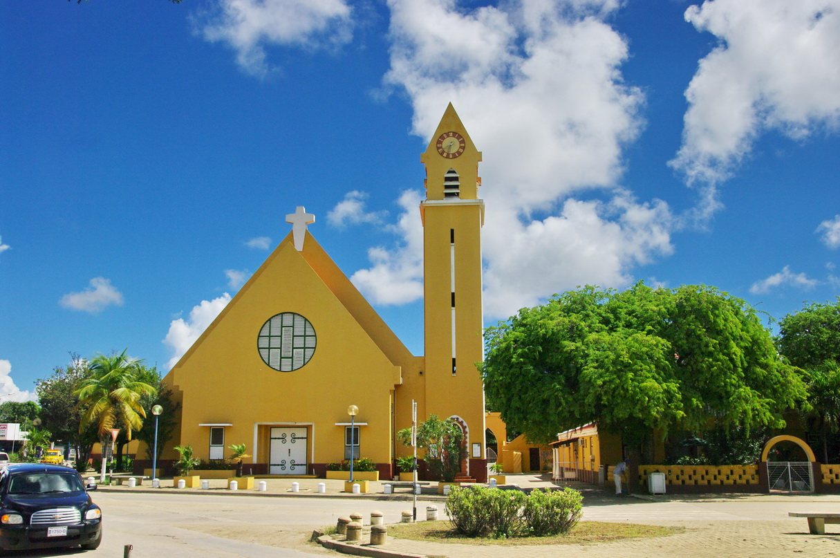 Kath. Kirche, Kralendijk, Bonaire